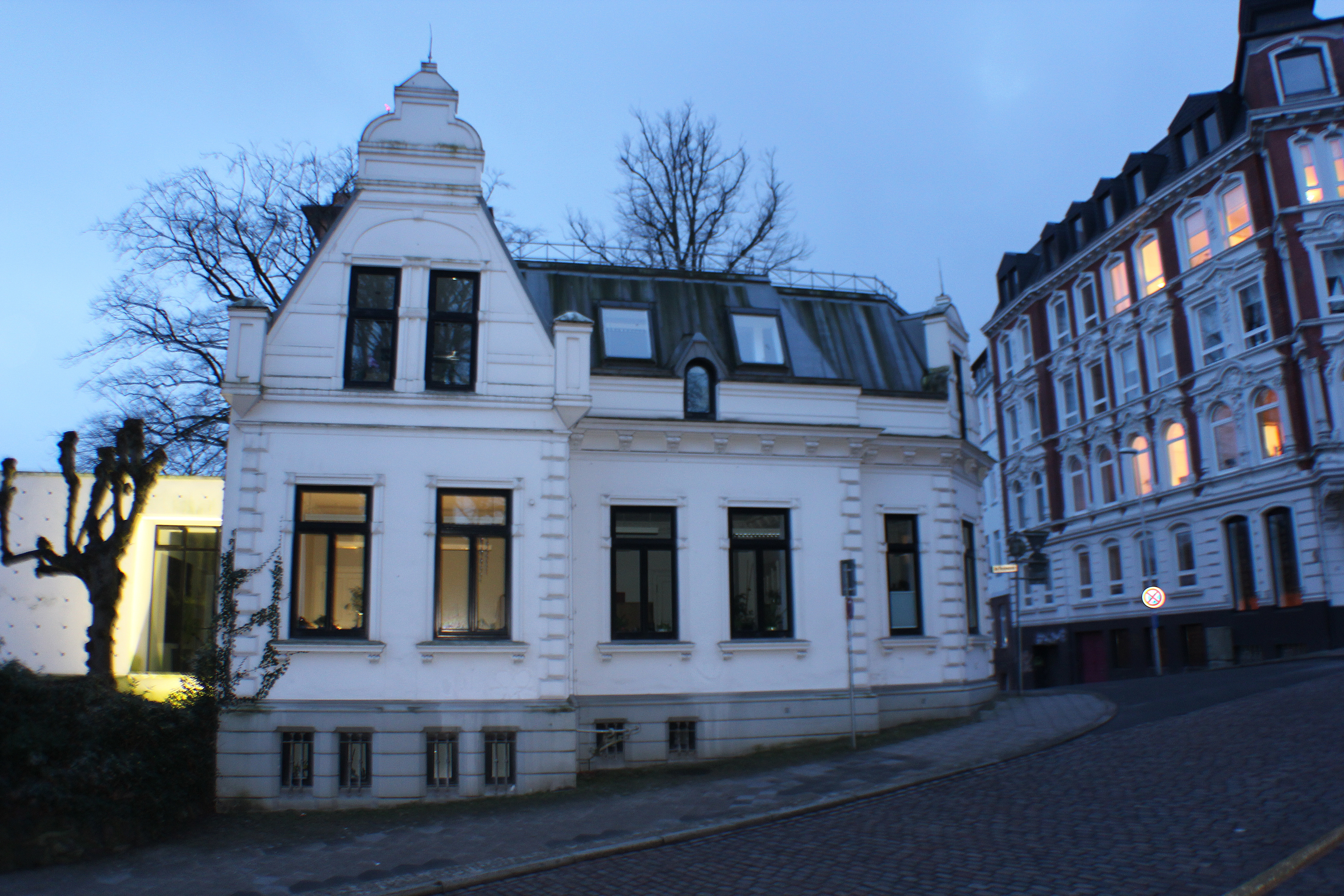 Besenbruchbude zur Nacht (Flensburg 2014)